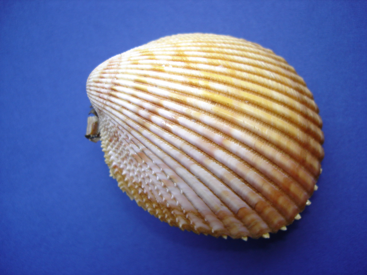 Große Zahnmuschel (Vasticardium luteomarginatum), Fundort Malediven